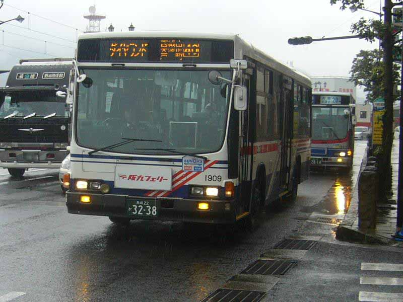 登録番号：長崎22か32-38 長崎自動車所属